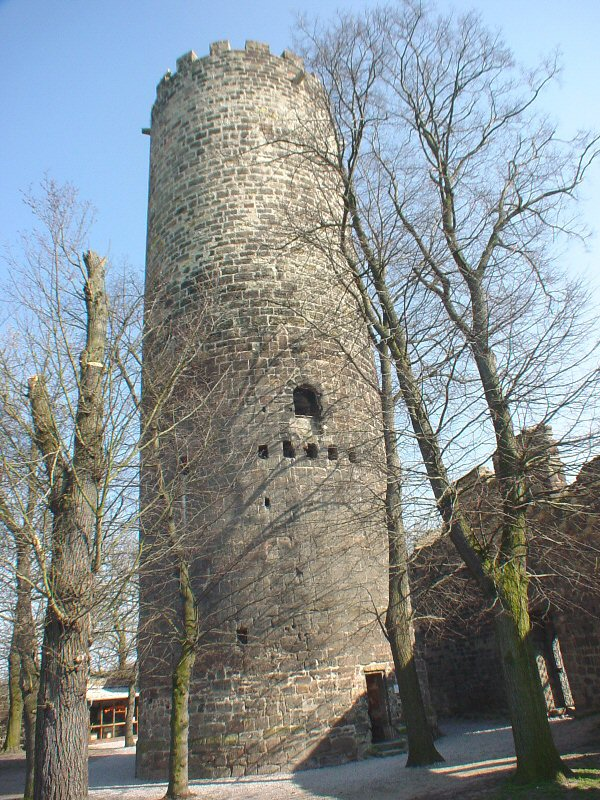 Schönburg